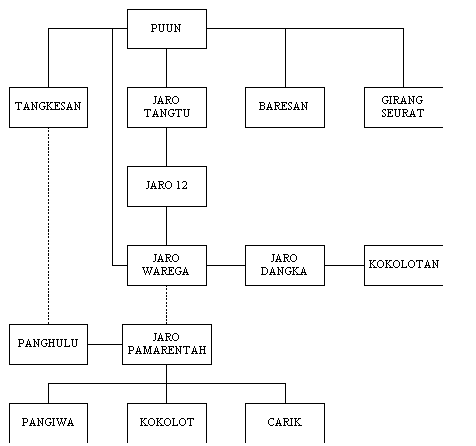 Struktur Pemerintahan Suku Baduy